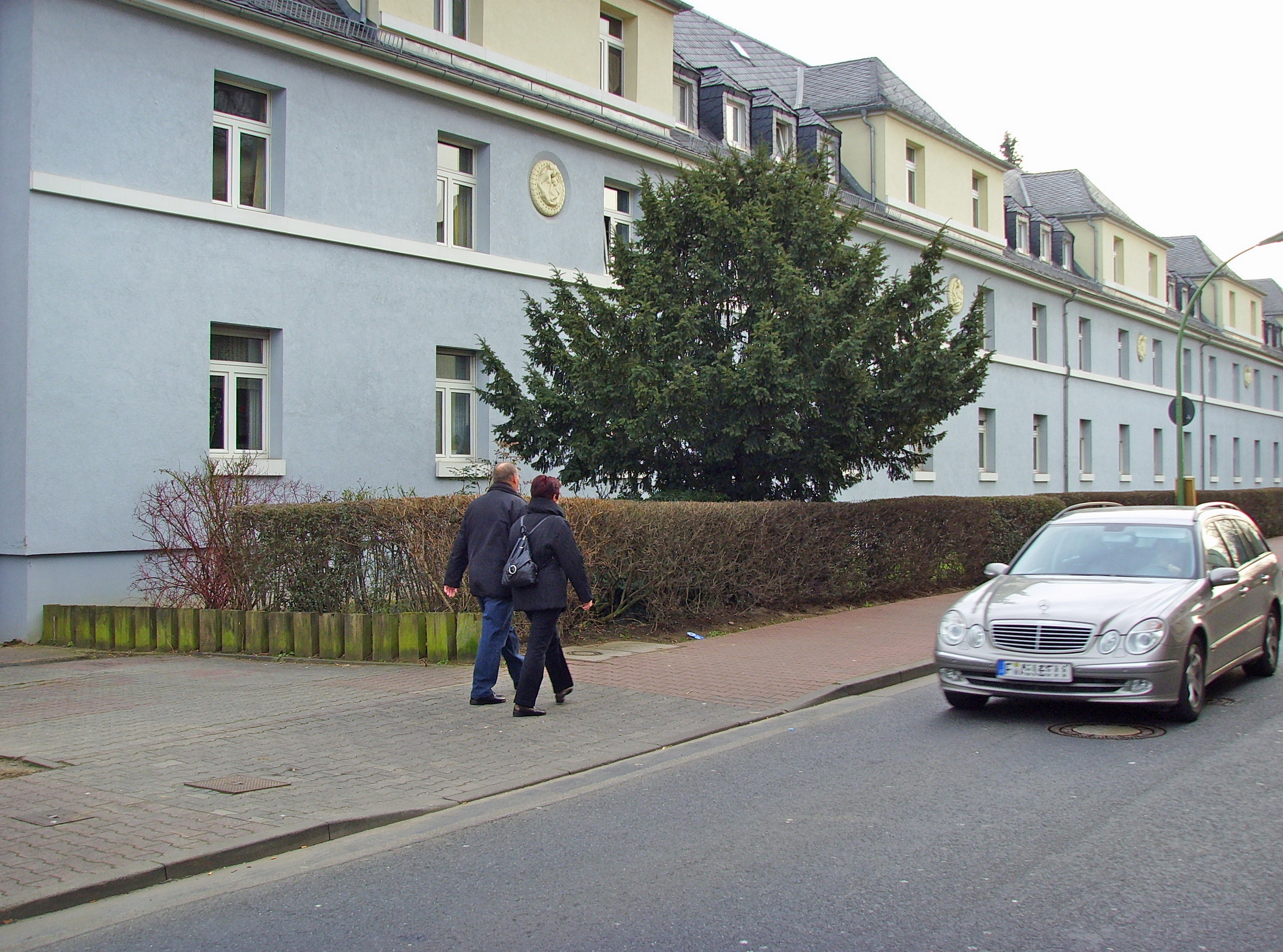 Frankfurt am Main-Heddernheim, Hessestraße 26-36, Wohnbebauung (seinerzeit moderne Arbeiterwohnungen) aus den 20er-Jahren